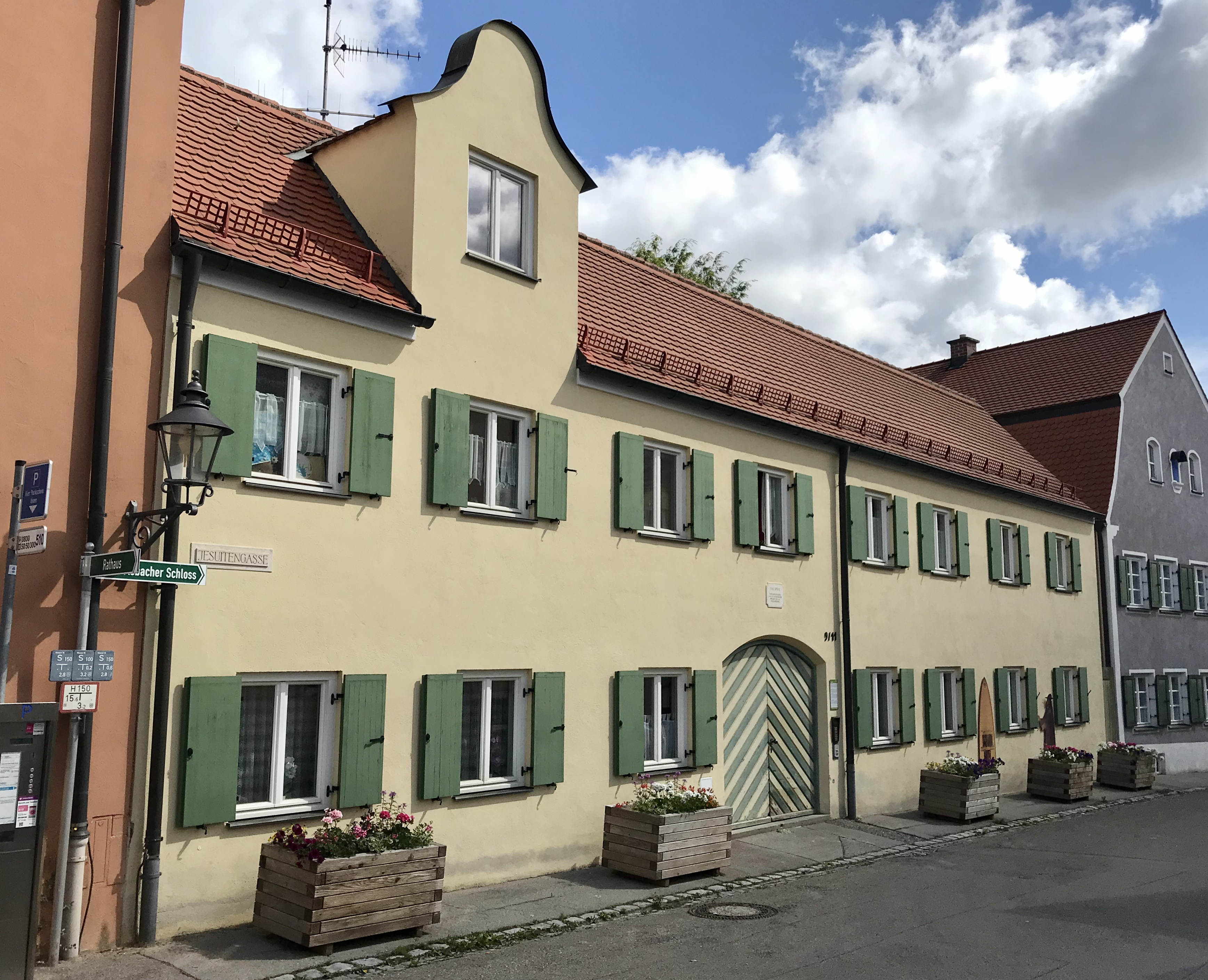 Ehemaliges Krankenhaus. Zweigeschossiger Walmdachbau, 1826 (dendrochronologisch datiert), Nordwand unter Einbeziehung der jesuitischen Klostermauer.